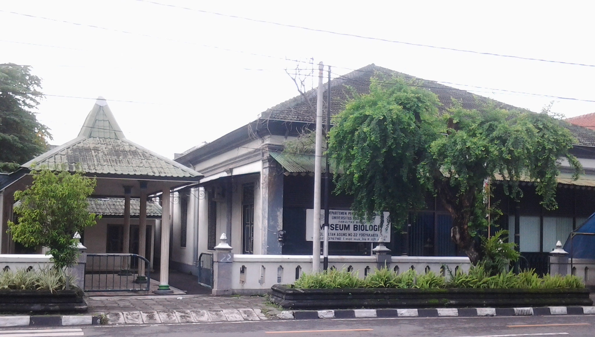 Museum Biologi Universitas Gadjah Mada. Museum ini beralamat di Jalan Sultan Agung 22 Yogyakarta, Indonesia.